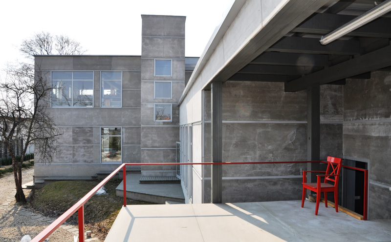 Здание Гридчинхолла